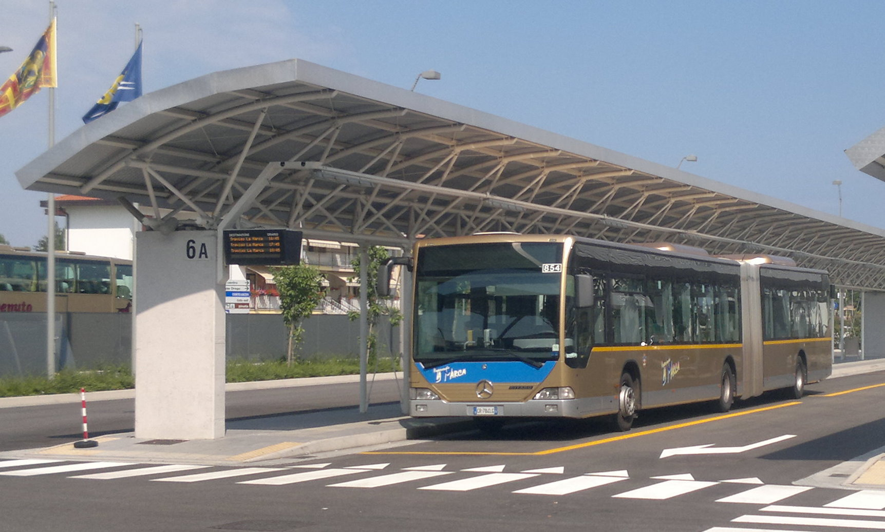 bus mercedes della società la Marca Treviso nell'autostazione di Jesolo lido